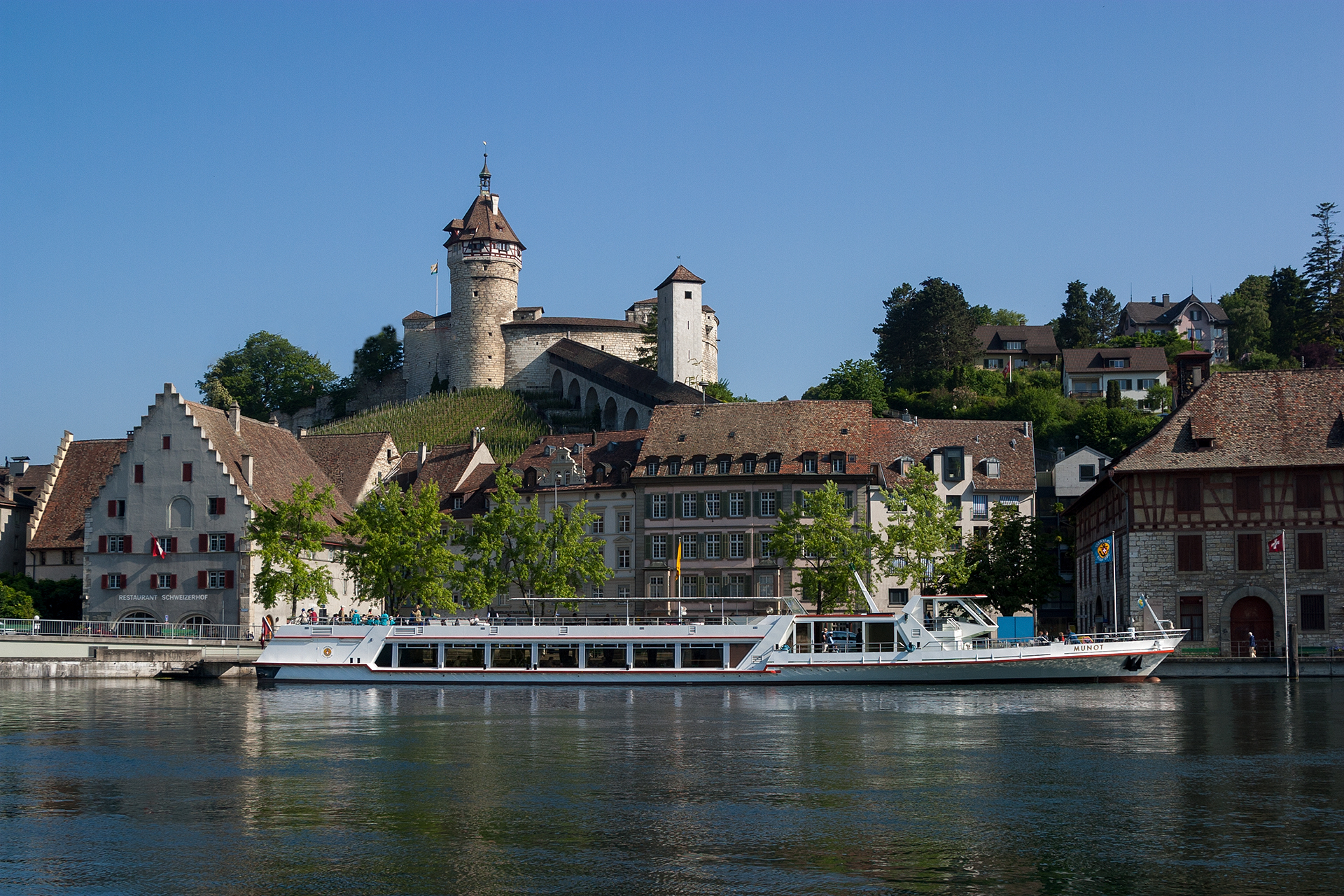 Schifflände in Schaffhausen mit Blick zum Munot